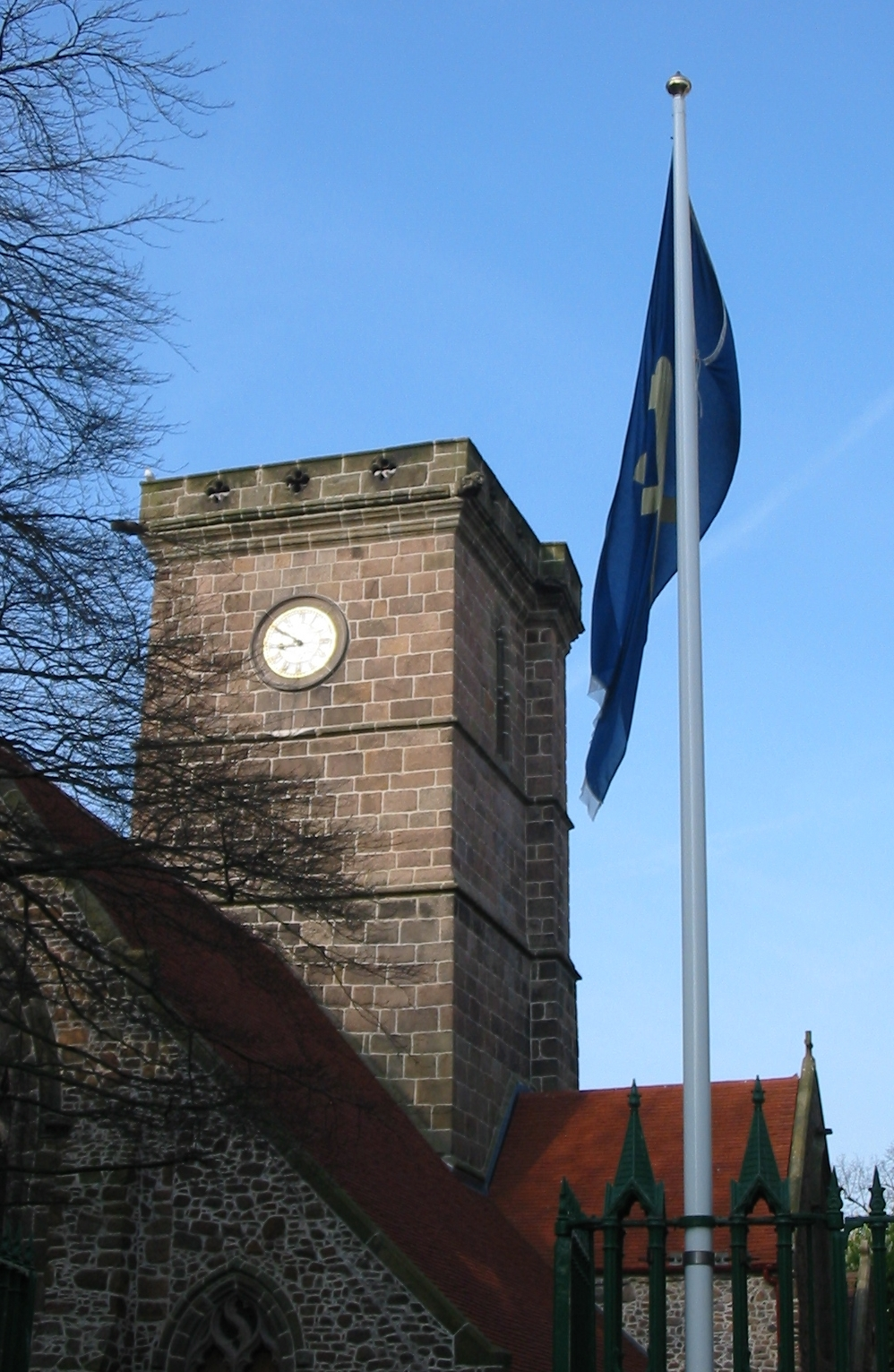 Nrf: Saint Hélyi, Jèrri